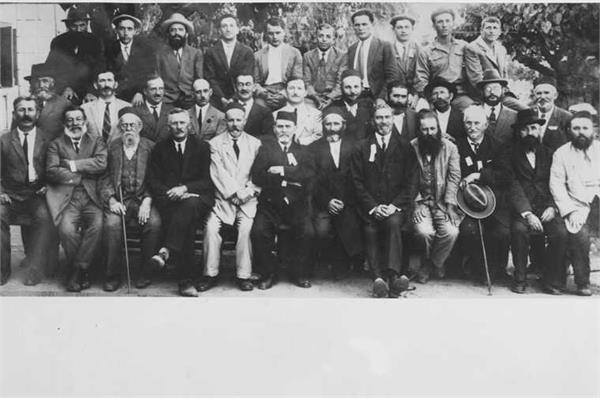 חברי מועצת המושבה פתח - תקוה בחוף יהודה